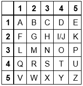 Cette image représente le carré de Polybe sous la forme la plus simple.